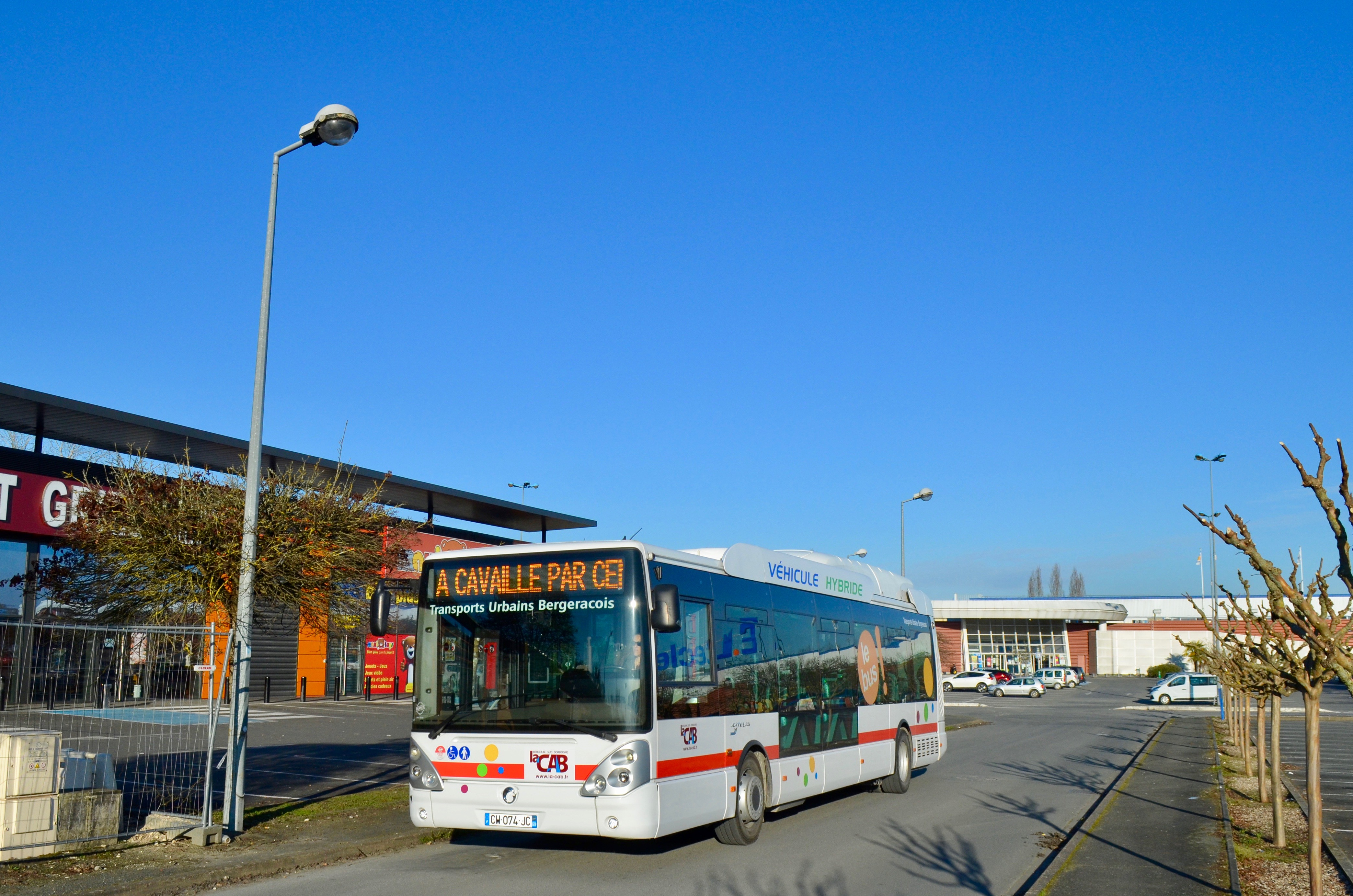 Bus du réseau de Berac en Dordogne sur la ligne A.